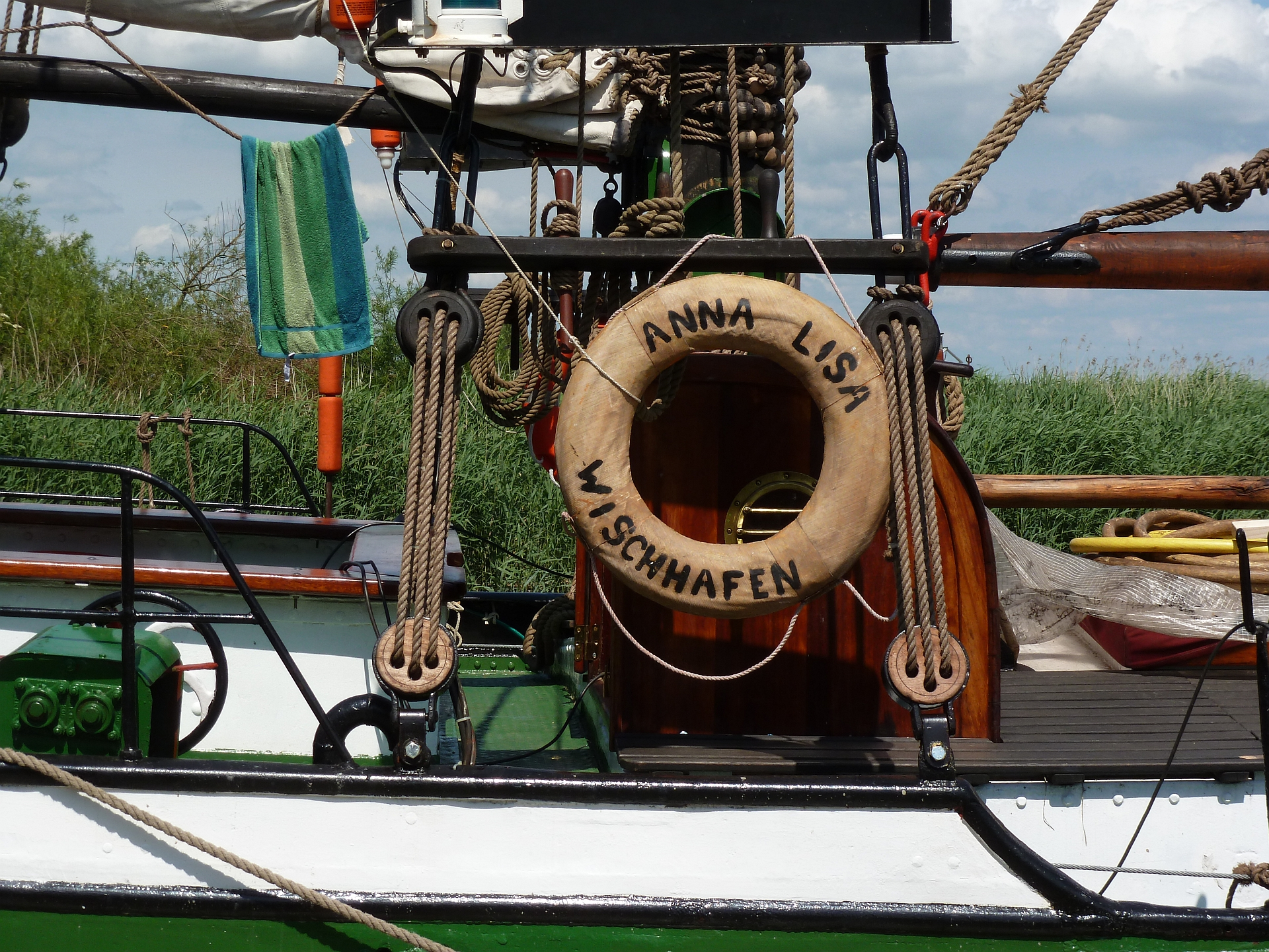 Teilansicht des Traditionsseglers Anna Lisa zum Thema Seemannschaft. Heimathafen Wischhafen (Museumshafen), Schiffstyp Besan-Ewer, Baujahr 1906, gebaut bei Junge in Wewelsfleth.